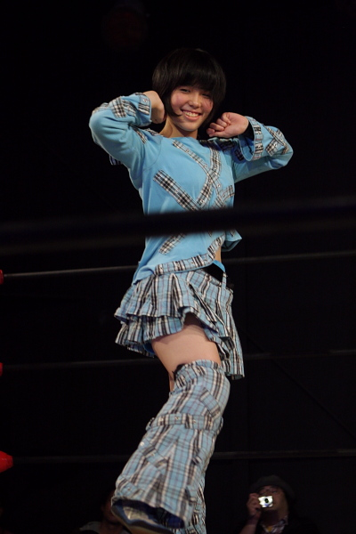 アイスリボン所属女子プロレスラー 都宮ちい